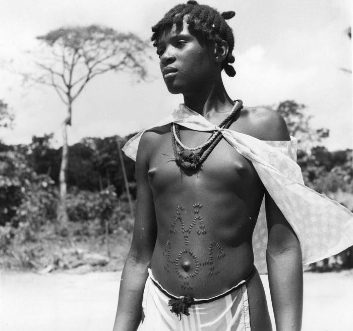 Foto. Het meisje Mè-oe-mè komt uit het dorp Keementi dat noordelijker ligt op het eiland Sajè. Haar kleding bestaat uit een Kaikon, over de schouders naar achter gedragen, een kwei over haar geslachtsdeel, gewikkeld aan het koordje, genoemd kamitèté en drie amuletten om haar hals. Verder is ze getatoeëerd op de buik. De tatoeage was bedoeld als mode en versiering van het lichaam, maar ook om te betasten door de man tijdens seksuele omgang met de vrouw. De vrouw op deze foto is inmiddels overleden. Zij behoorde in het dorp Puketi te wonen omdat haar moeder daarvandaan kwam, binding aan geboortegrond gaat via matrilineaire lijn. . Portret van een jonge Marron vrouw in Saje, met scarificaties en amuletten tegen haar ziekte FramboesiaDansk: Foto. Pigen Mè-oe-mè kommer fra landsbyen Keementi på nordsiden af øen Sajus. Hendes tøj består af en Kaikon, bæres over skuldrene tilbage, en Kwei over hendes kønsdele, indpakket i tråde, kaldet kamitète og tre amuletter omkring hendes hals. Hun er også tatoveret på maven. Tatoveringen var tænkt som mode og udsmykning af kroppen, men også for at famle af manden under samleje med kvinden. Kvinden i dette billede er nu afdøde. Hun hørte i landsbyen Puketi at deltage, fordi hendes mor kom derfra, arvefølgen til jorden går gennem kvindelinjen.